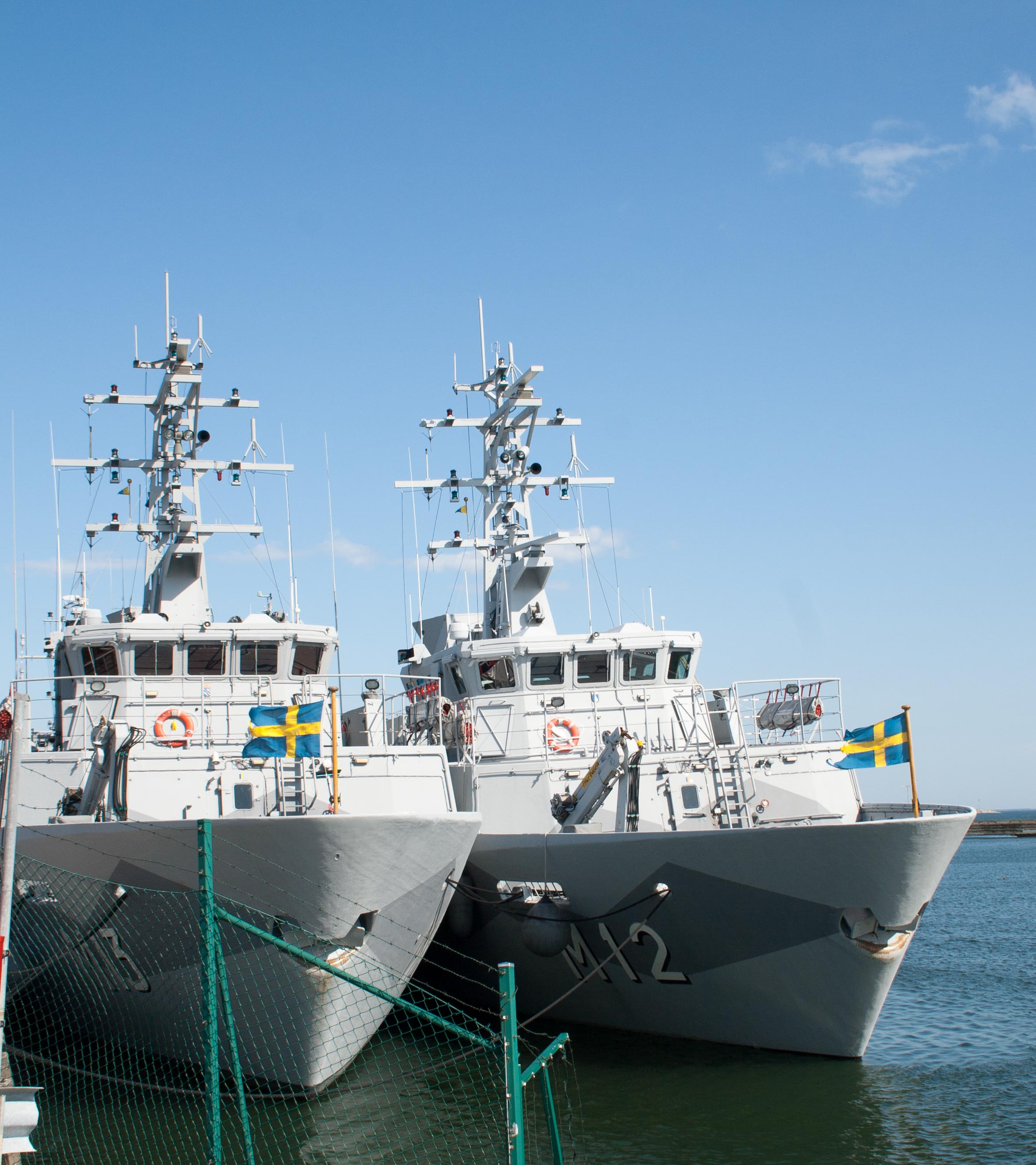 Ships at Berga navy base